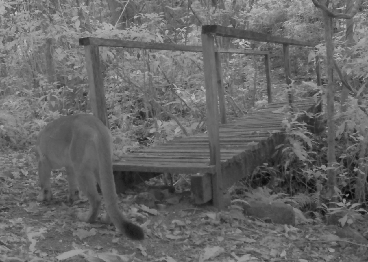 Puma concolor captado junto a un puente dentro de La Estación Científica Las Joyas mediante una cámara trampa